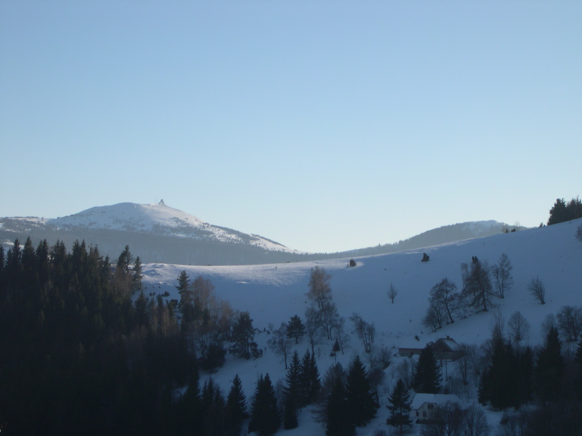 Vue sur la partie sommitale du massif des Vosges, en Alsace, le versant N/E du Grand Ballon et du Storkenkopf.